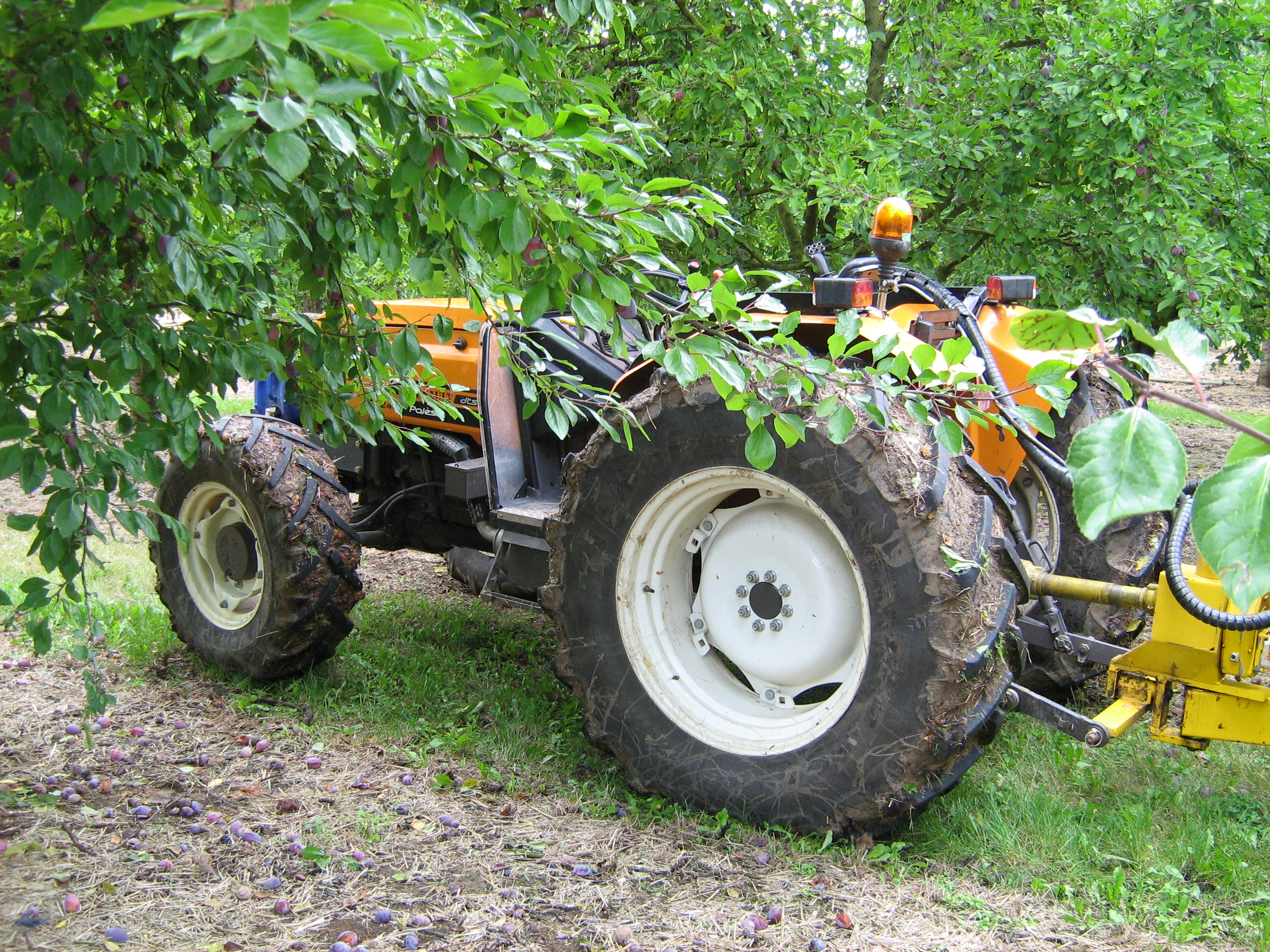 Renault Palès 240 tractor – Tracteur de puissance moyenne pour les arboriculteurs, ou agriculteur des années 2000